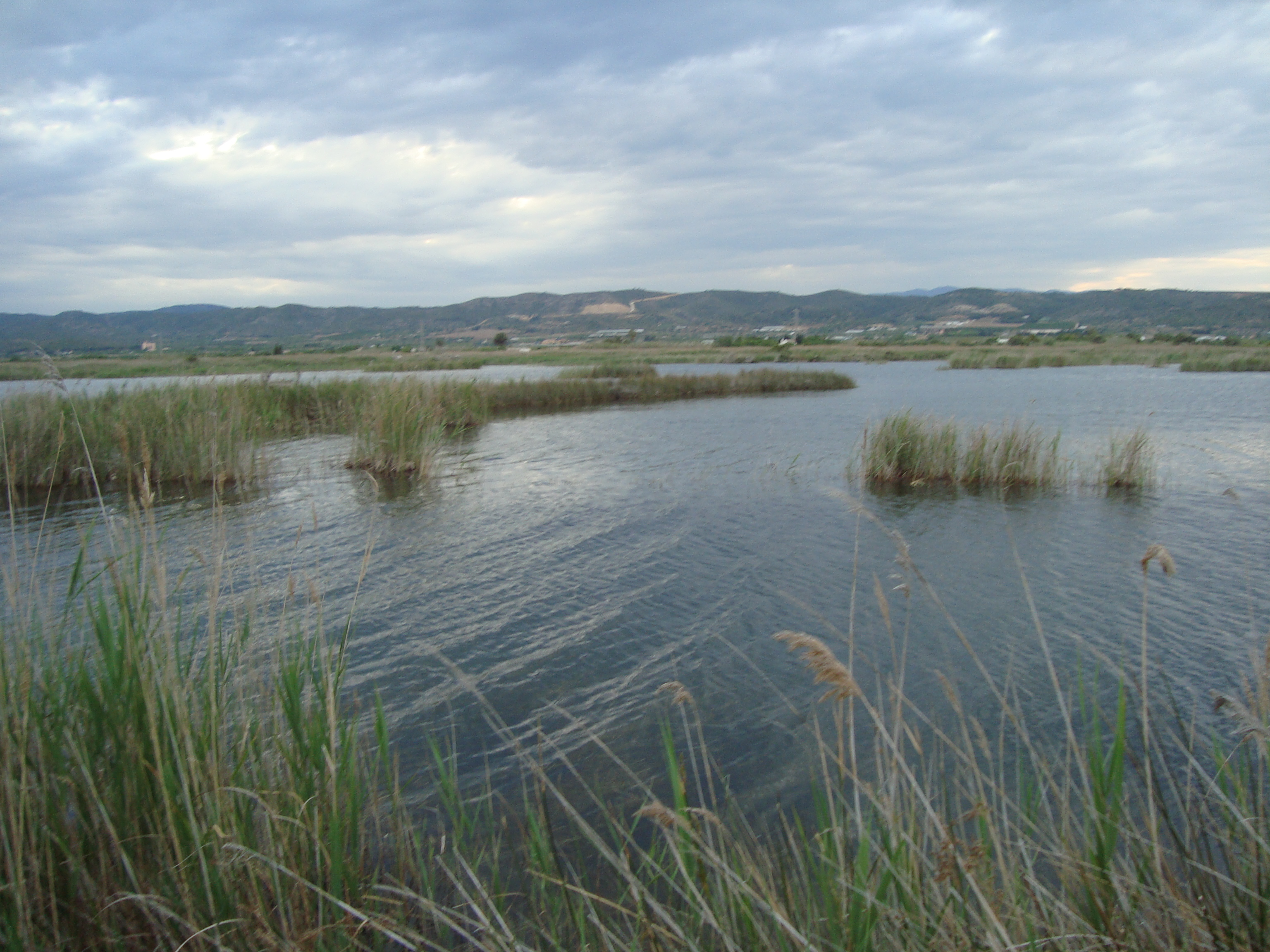 Lagunas de Torreblanca This is a photography of a Special Area of Conservation in Spain with the ID: ES0000060. Natura2000 entry, EEA entry